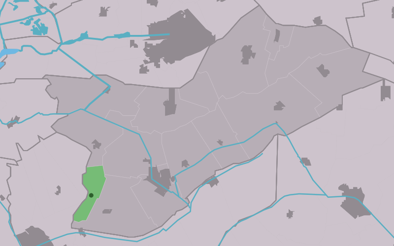 Kaartsje fan himrik fan Lúkswâld